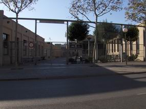 Edifici de l'antic Vapor Llonch destinat a seu educativa i molt més